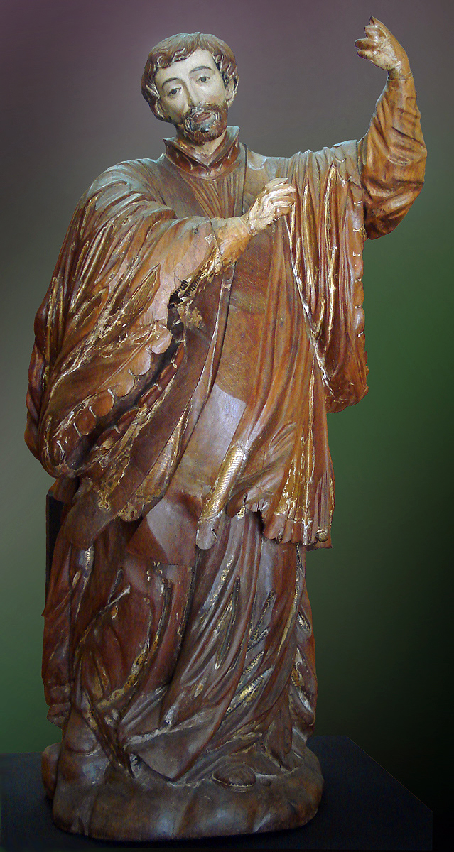 São Francisco Xavier, século XVIII, importante exemplar de Arte Missioneira pertencente ao acervo do Museu Júlio de Castilhos, em Porto Alegre, Brasil. Autorização para fotografia gentilmente concedida pela Direção do Museu apenas para uso na Wiki.